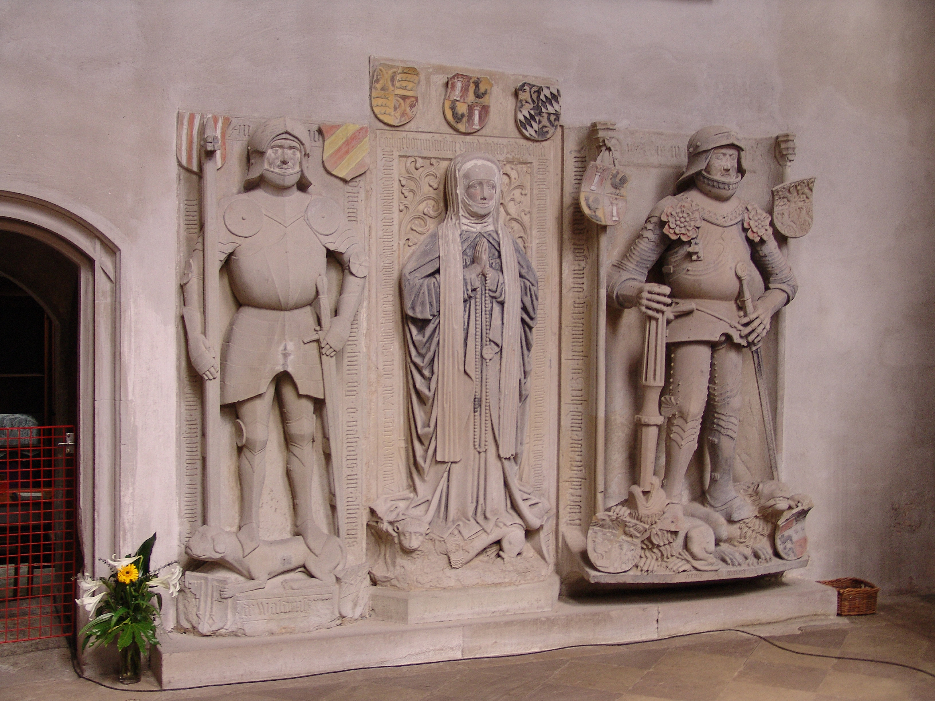 Römhild - Stiftskirche Grabmale von Albrecht von Waldenstein, ein Lehnsmann des Grafenhauses, der sich bedeutend an der Stiftung beteiligte und seine letzte Ruhestätte in der Kirche fand. (1470 gest.) Elisabeth von Württemberg, Ehefrau von Friedrich II. (1501 gest.) Friedrich II. von Henneberg, ein Sohn des Stifterpaares und späterer Regent. (1488 gest.)